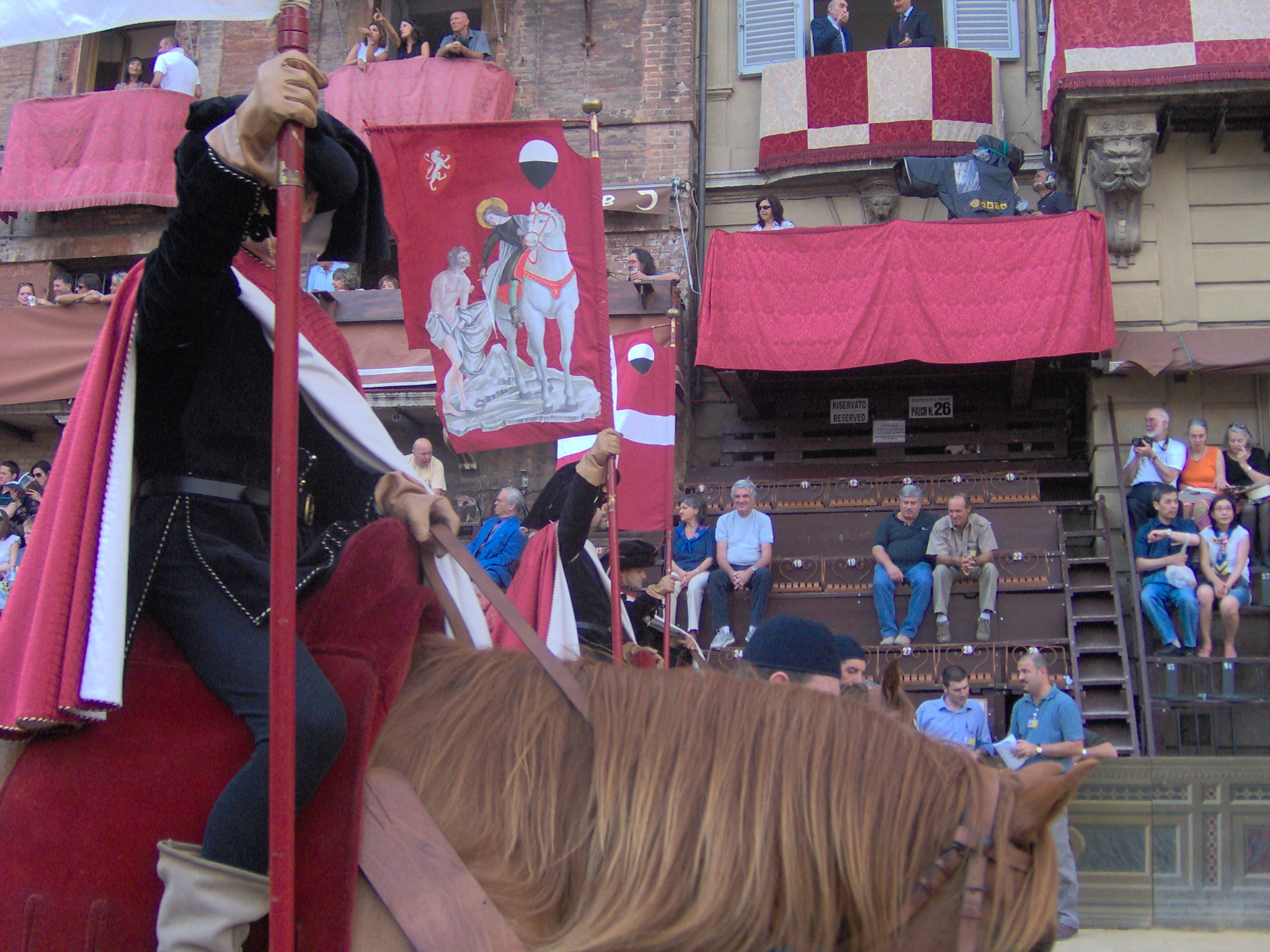 Image del corte del Palio di Siena - agosto 2006